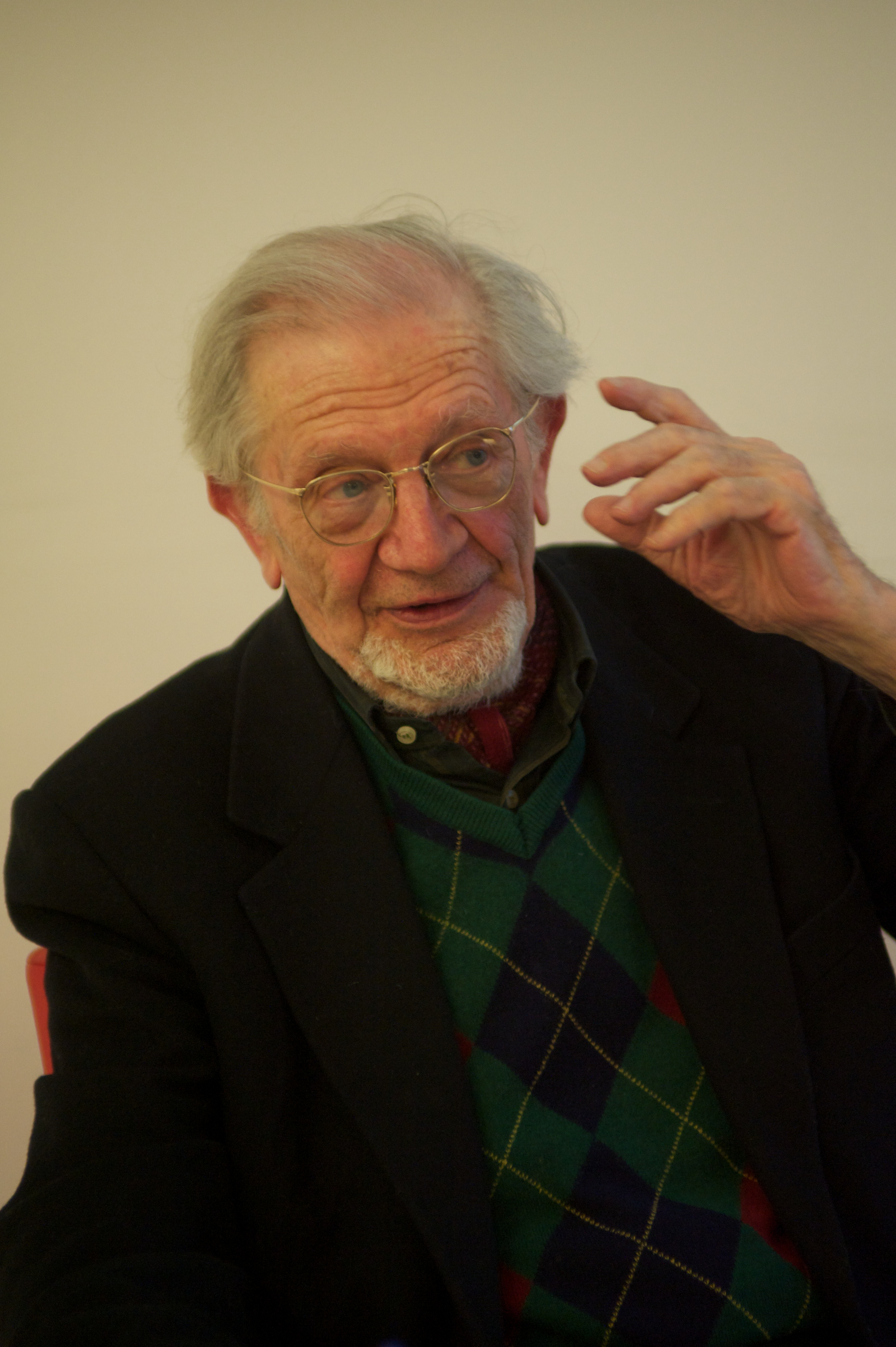 Fulvio Fo